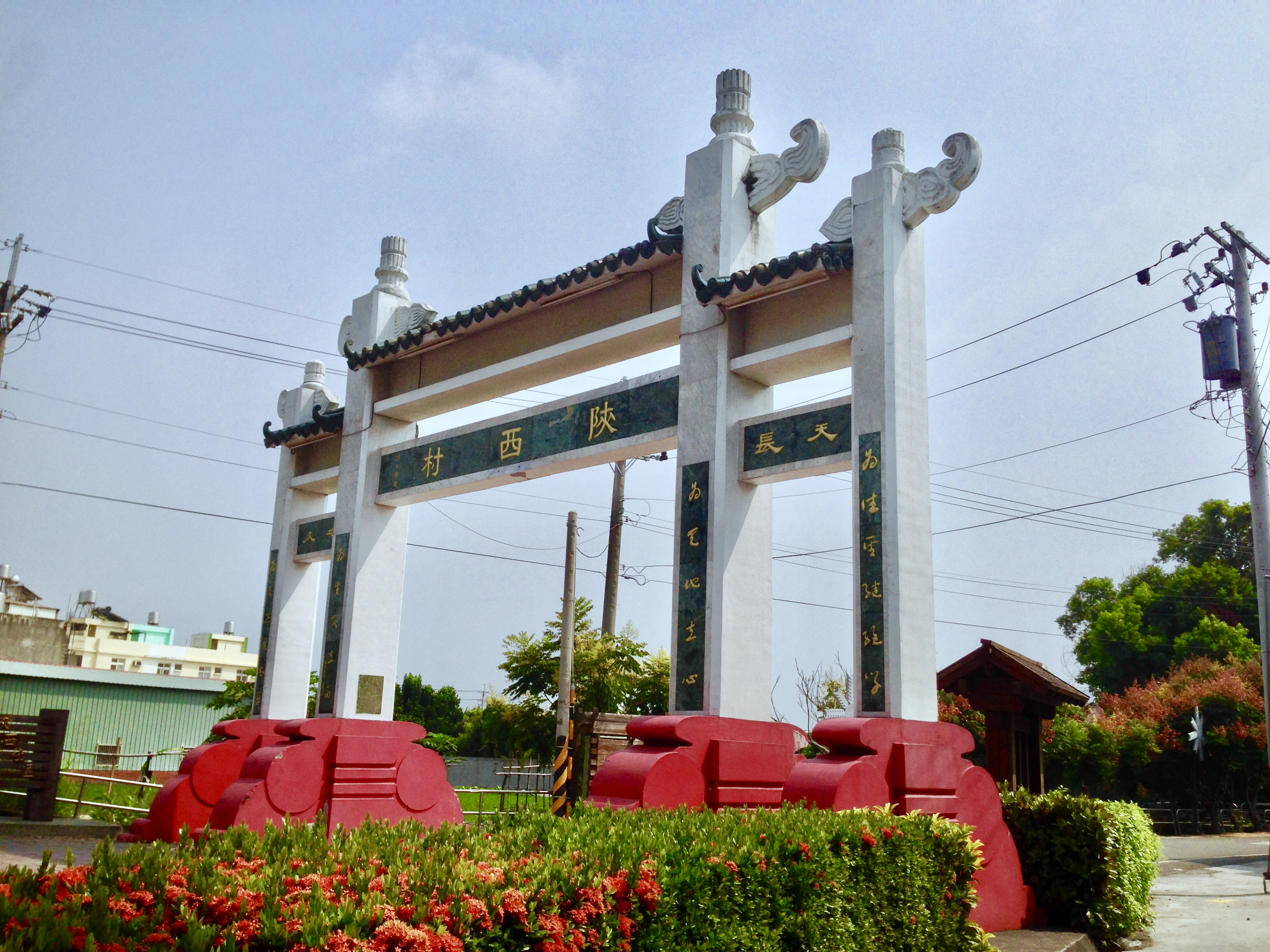 陝西村牌樓正面